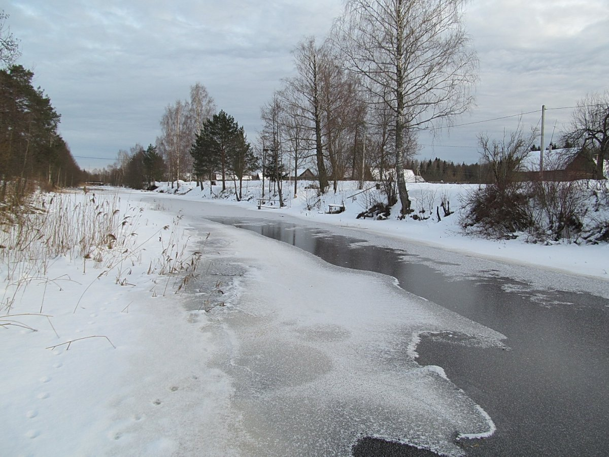 Валова Гара. Бярэзінскі канал